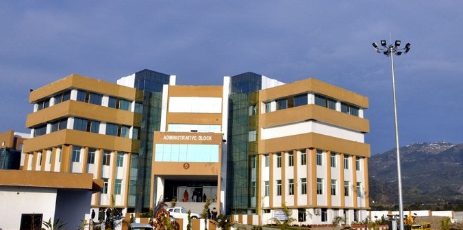 adminmau1.jpg